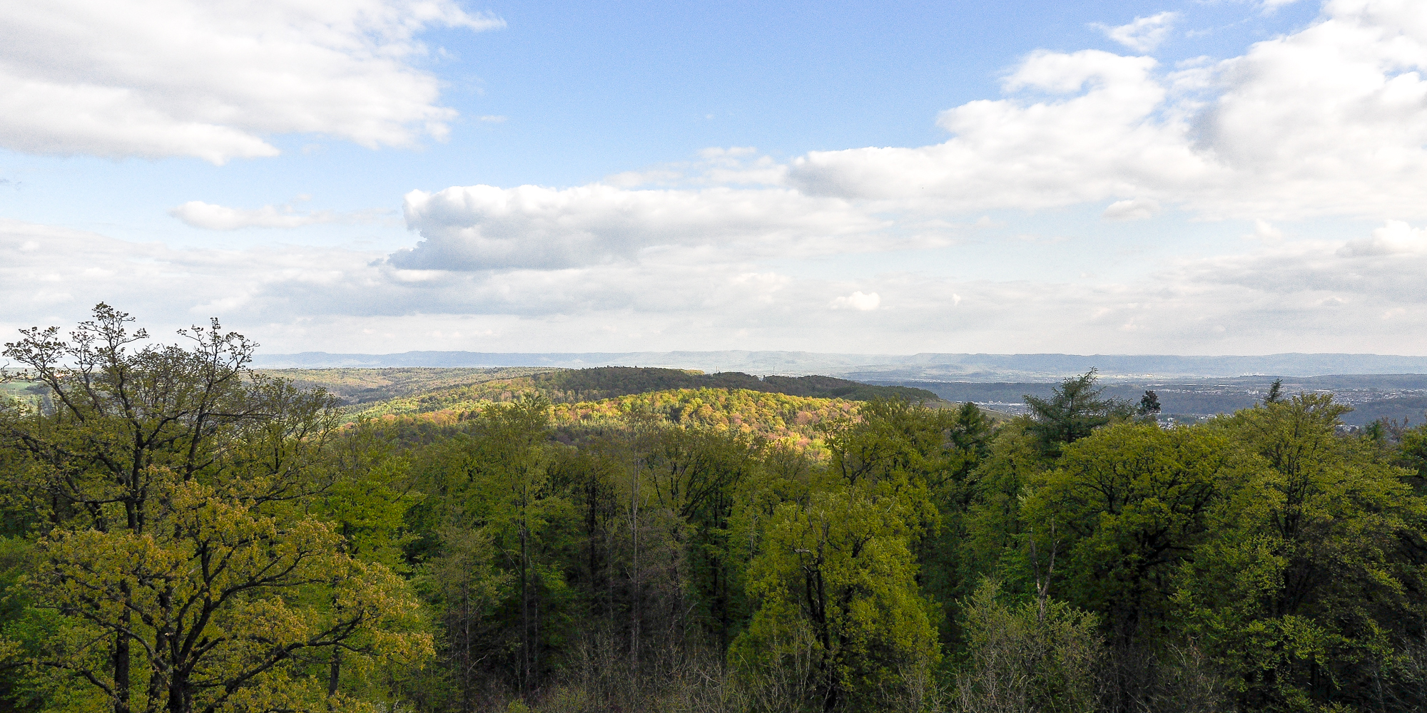 Über den Buchenwald, das Neckartal schaut man auf die Blaue Mauer der Alb. Landschaftsschutzgebiet 1.19.015 „Kappelberg, Kernen, Haldenbach-, Strümpfelbach- und Beutelsbachtal mit angrenzenden Höhen“